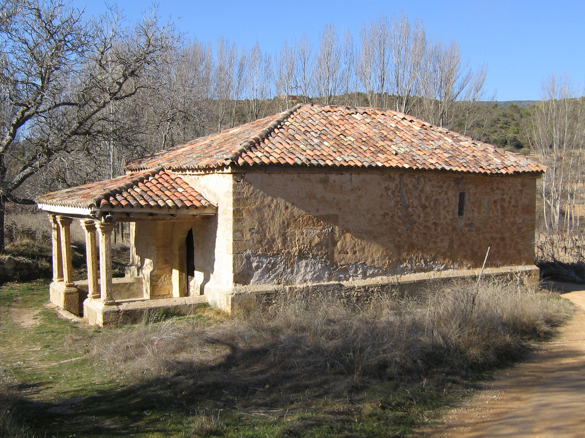 Ermita de San José de Huetos (Cifuentes, Guadalajara, España).